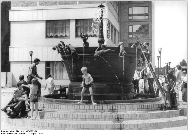 Magdeburg, Teufelsbrunnen ADN-ZB Uhlemann 2.8.86 Magdeburg: Teufelsbrunnen-Der Brunnen in der Magdeburger Leiterstraße, eine große "Badewanne" mit einem Durchmesser von 3, 40 Meter, hat sich im Nu die Sympathie der Magdeburger erobert. Der obere Rand der Brunnenschale aus Bronze wird von 22 kleinen Plastiken - Märchen- und Fabelwesen - bevölkert. Vier lebensgroße reale Figuren, die Badende darstellen, schließen das Ensemble zur Straße hin ab. Geschaffen wurde dieses originelle, heiter stimmende Kunstwerk von dem in Magdeburg lebenden Bildhauer Heinrich Apel. Die Brunnenschale wurde im Betriebsteil Waren des Dieselmotorenwerkes Rostock gegossen. Die Figuren erhielten im VEB Takraf Lauchhammer ihre bronzene Gestalt. Arbeiter des Bau- und Montagekombinats Magdeburg montierten die Anlage. Mitte Juni 1986 feierten die Magdeburger die Einweihung mit einem großen Brunnenfest. (siehe dazu 1986-0802-2-5 N und 1986-0801-305 N)